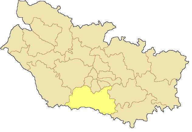 Canton d'Ailly-sur-Noye dans le département de la Somme